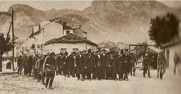 Арестувани въстаници.